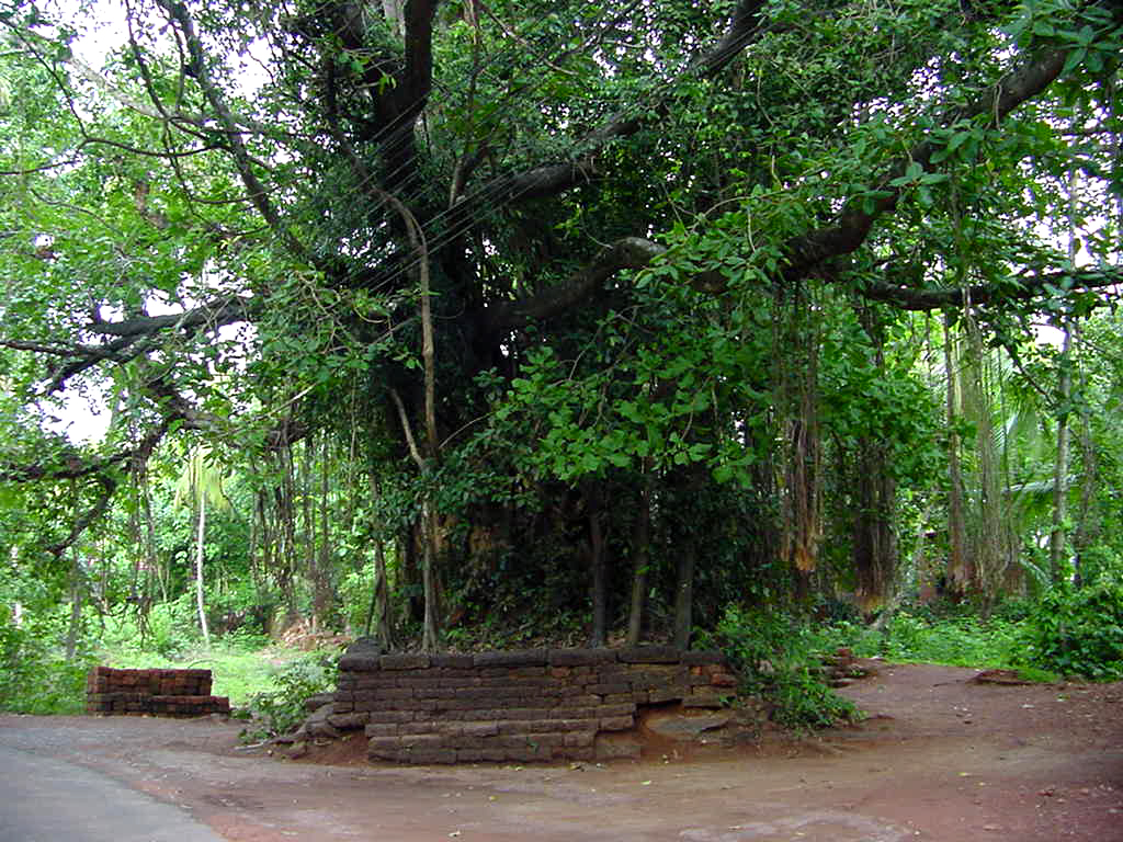 The age old Banyan tree at Kanhirathara, Chirakkal,Kannur